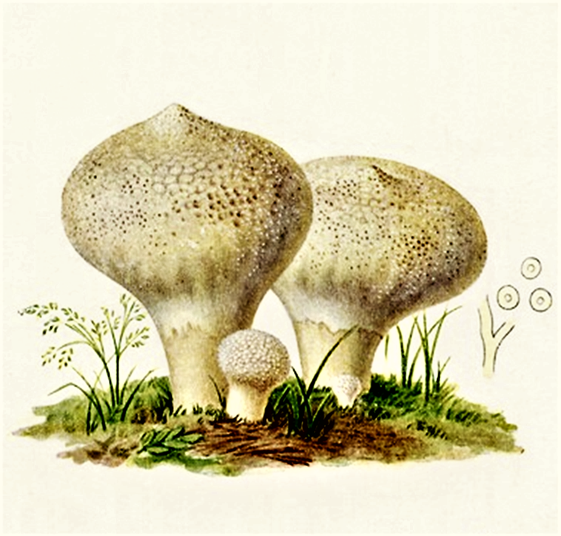 Giacomo Bresadola: Lycoperdon gemmatum (Batsch, 1783), heute (Lycoperdon perlatum Pers. (1796)